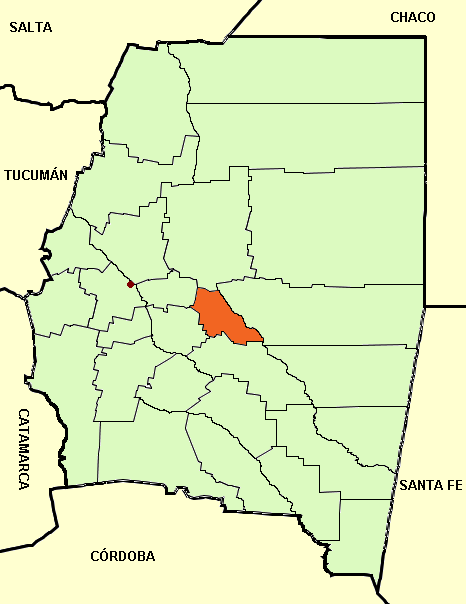 Mapa editado de: Santiago del Estero province (Argentina), departments and capital.png